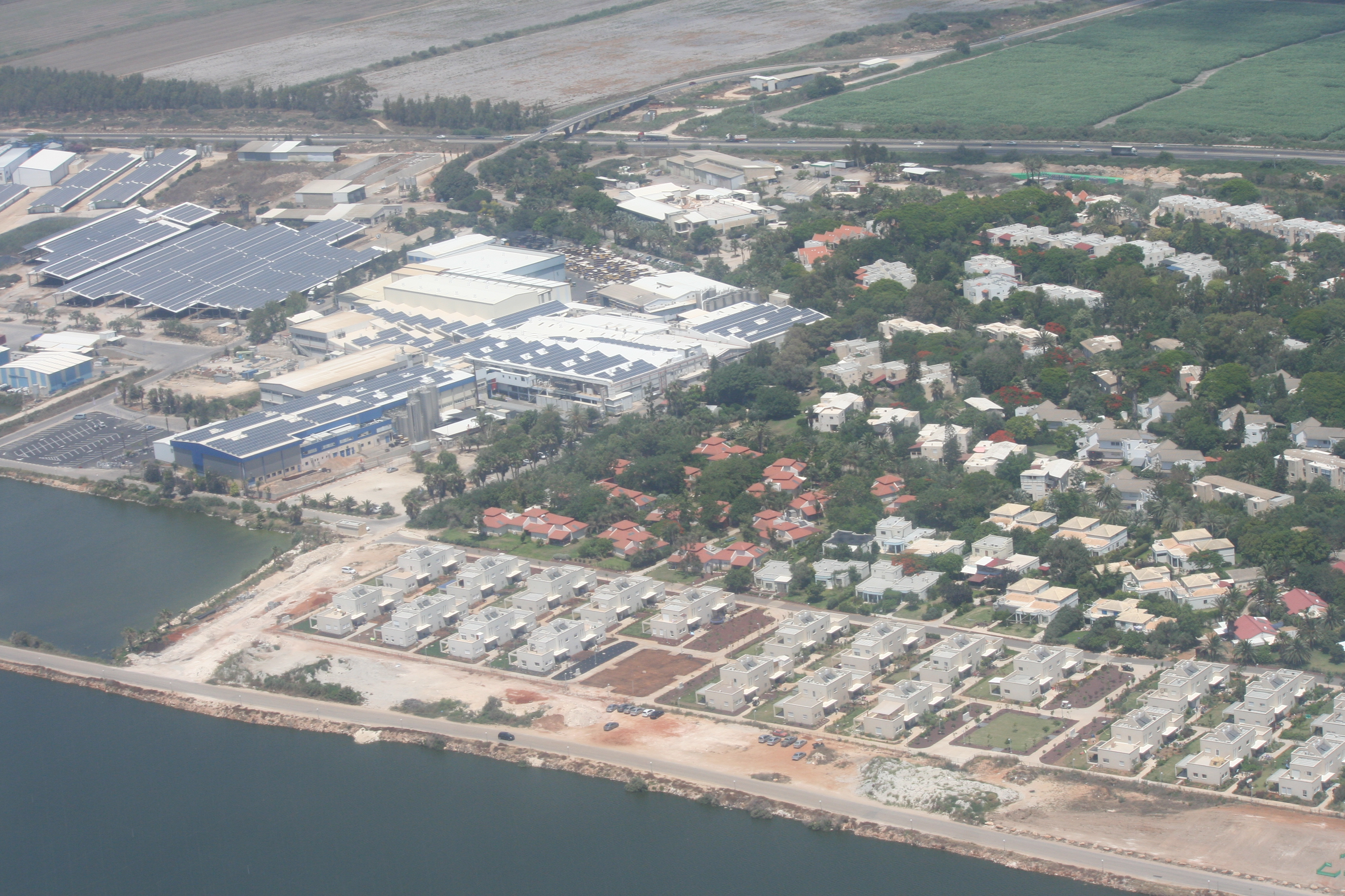 מעגן מיכאל ומפעל פלסאון